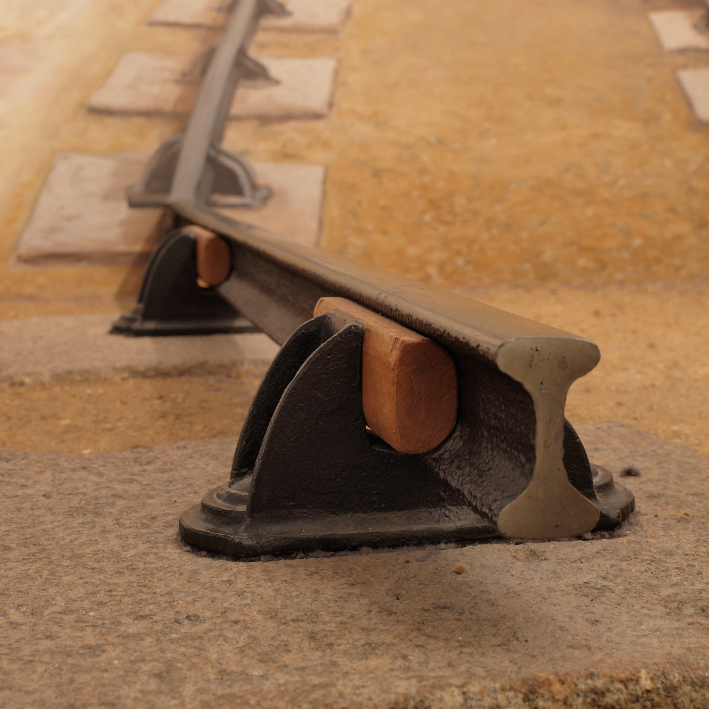 Verkehrsmuseum Nürnberg, Doppelkopfschiene mit Schienenstuhl und hölzerner Verkeilung auf Granitblock befestigt